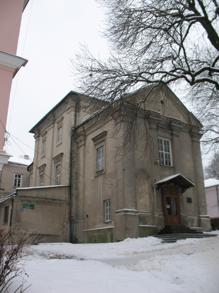 Уніатська церква св. Миколая в Холмі, Фото І. Парнікози. 2009 р.